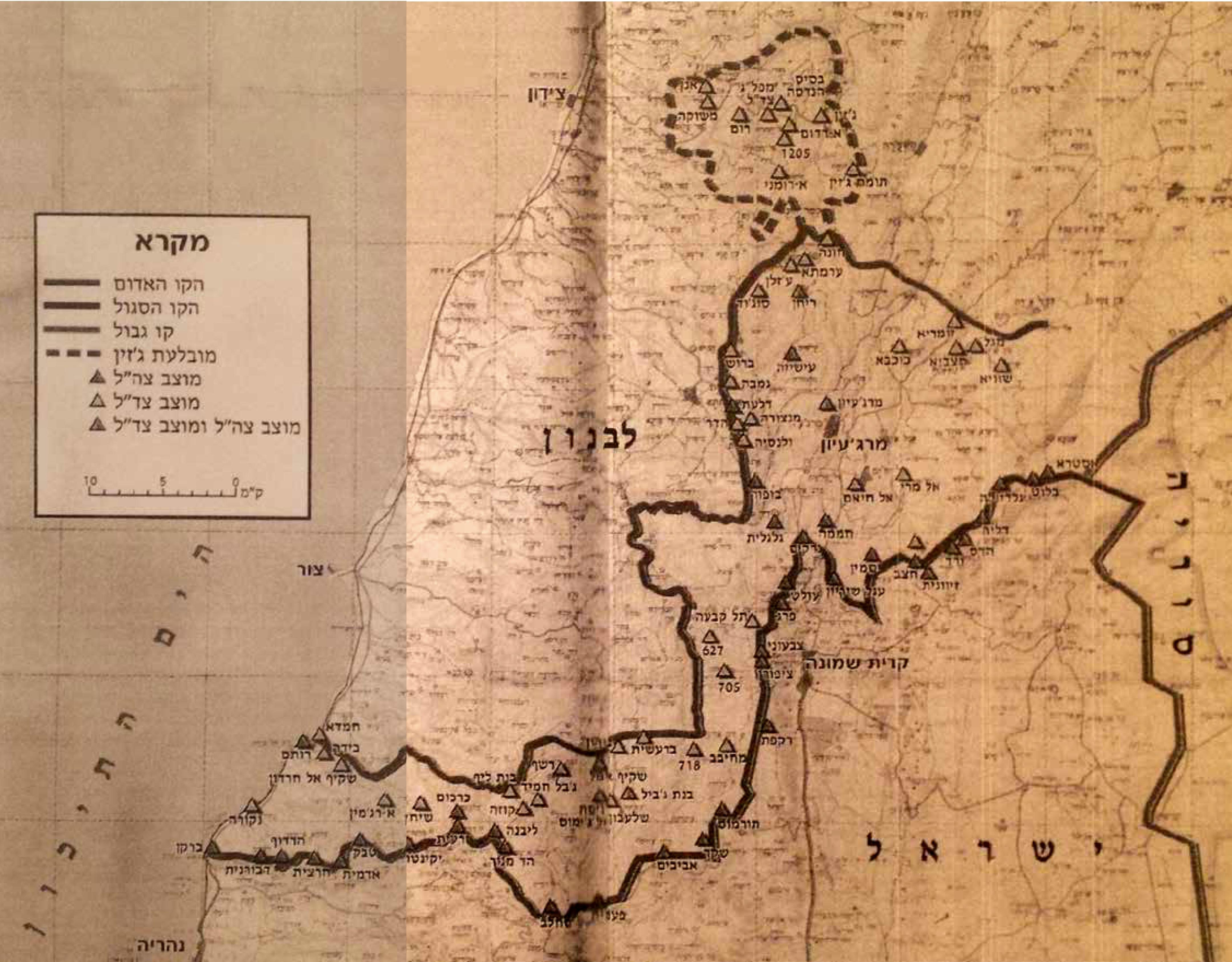 מבצע חוק וסדר. אזור הביטחון ומובלעת ג'זין. חיזבאללה נמנע מלהקים בסיסי פעולה בכפרים שאינם מיושבים, והחל לפעול מלב האוכלוסייה האזרחית השיעית בדרום לבנון, המשמשת לו כקו תמיכה.